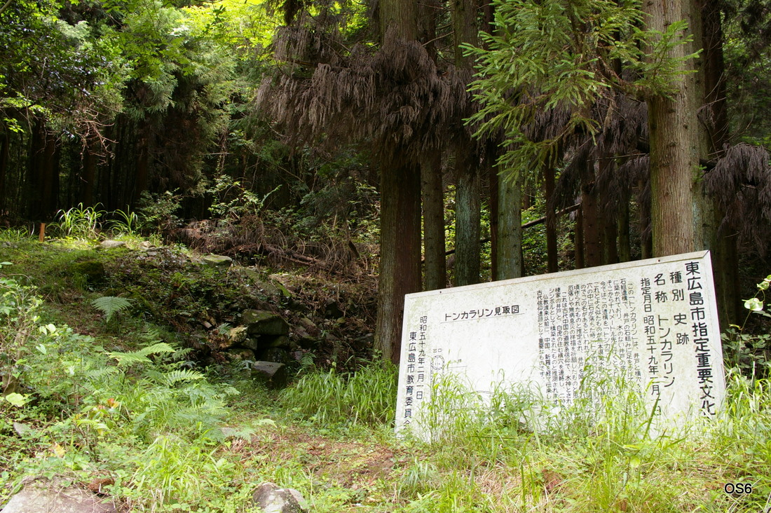 広島県東広島市のトンカラリン遺跡